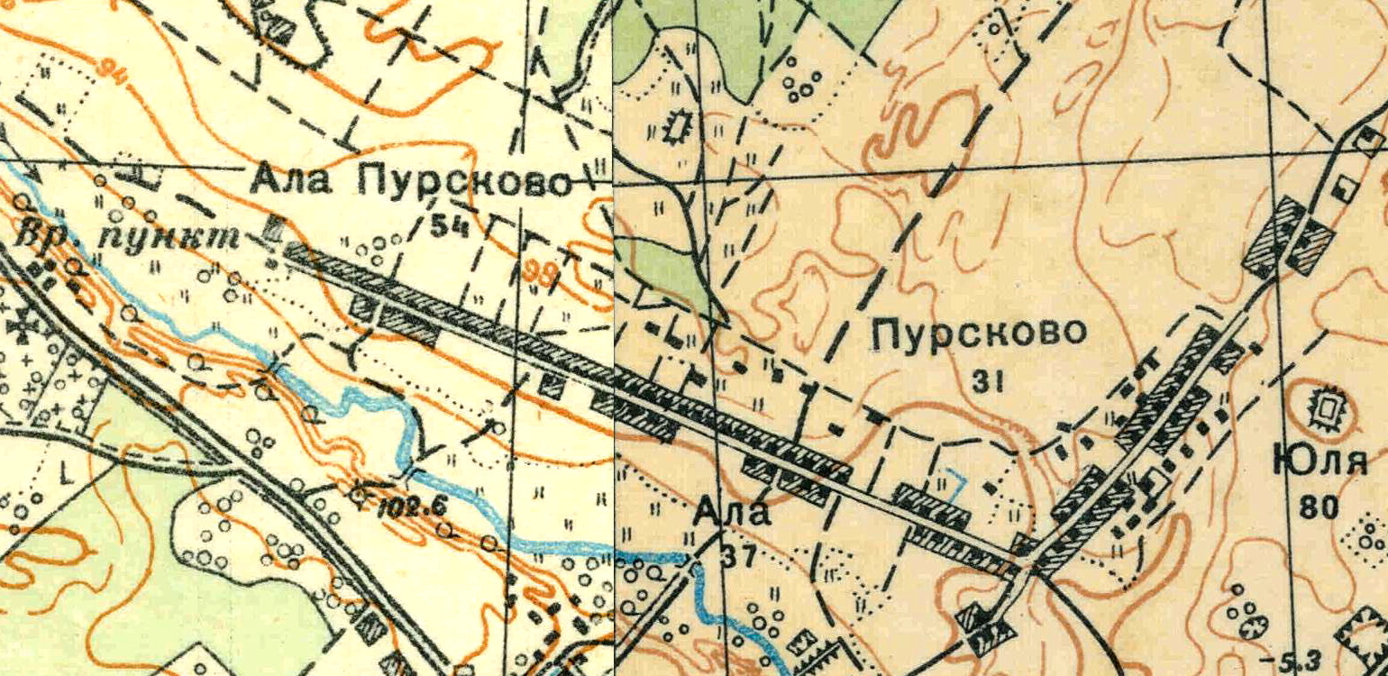 Топографическая карта Ленинградской области, квадрат О-36-13-А-а (Большая Пудость), деревни Алапурская и Юля-Пурская